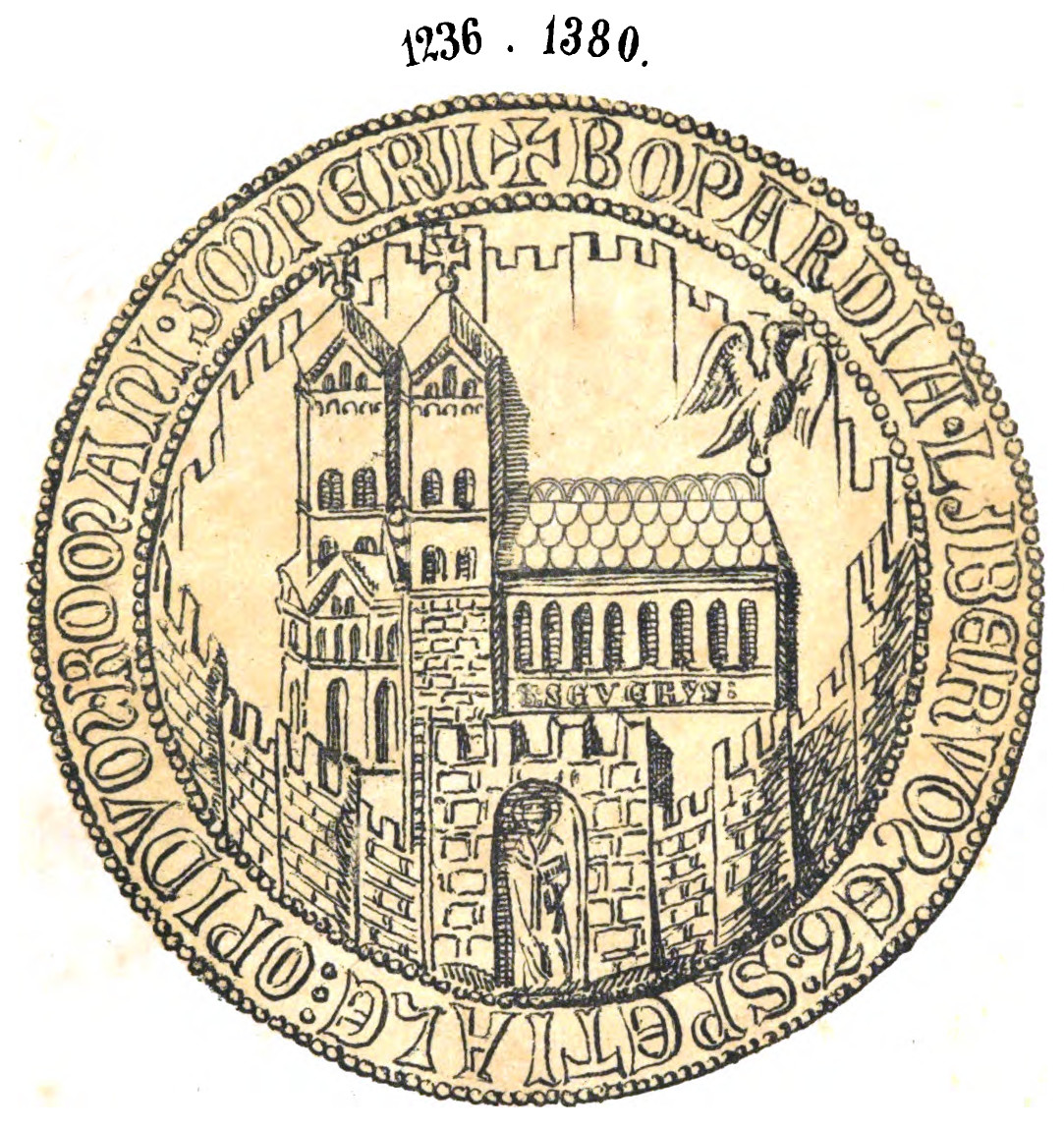 Abdruck des Stadtsiegel von 1236 der Stadt Boppard mit der Kirche St. Severus - Das originale siegel befindet sich heute im British Museum in London.